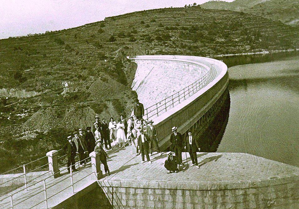 Excursió al pantà de Riudecanyes a l'agost de 1919